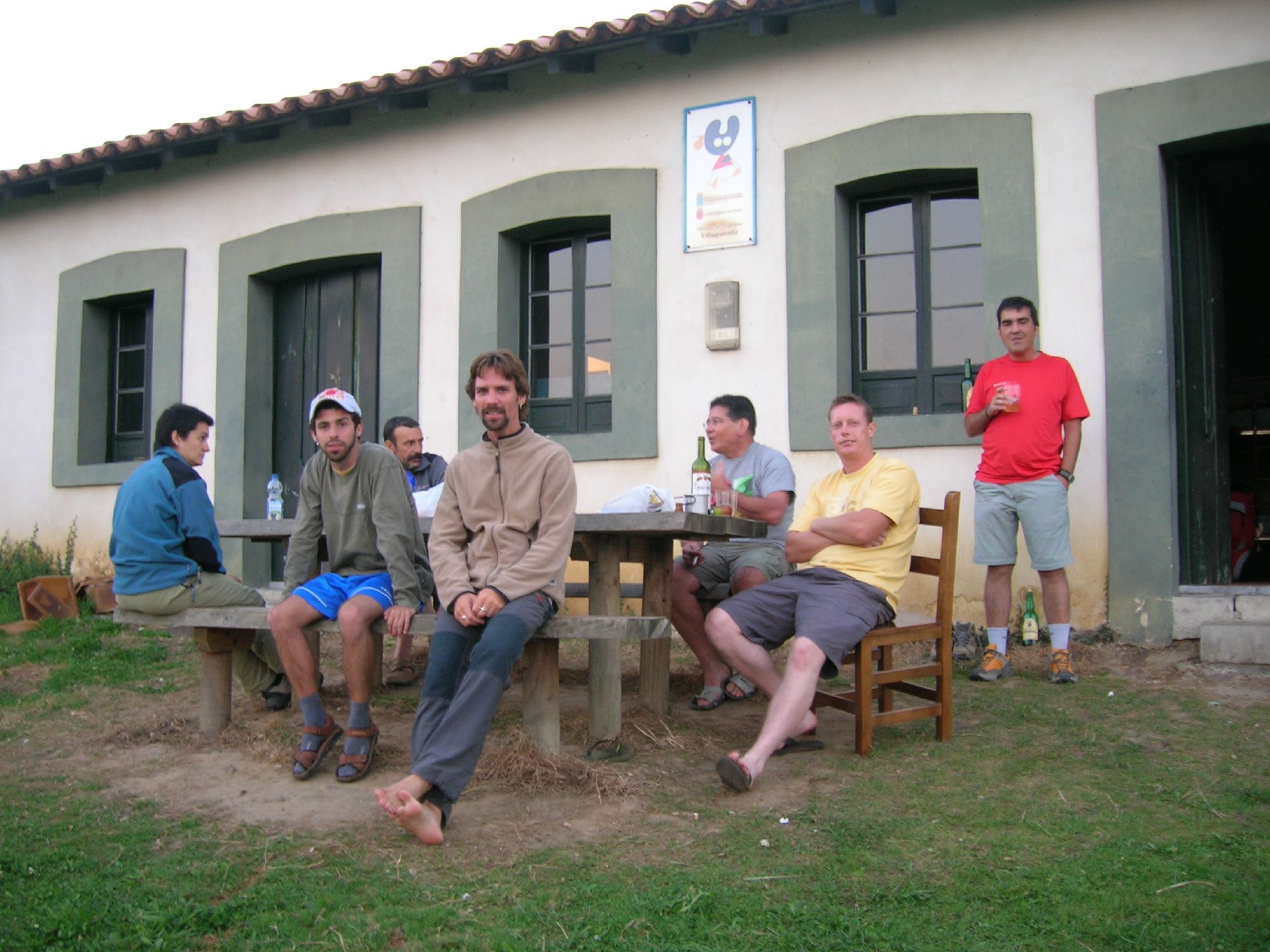 Albergue de peregrinos de San Juan de Villapañada. A partir de aquí y hasta A Fonsagrada, estos fueron nuestros inseparables compañeros de fatigas en cada final de etapa. Todos menos Mike que cogió carrerilla y no volvimos a verlo más.